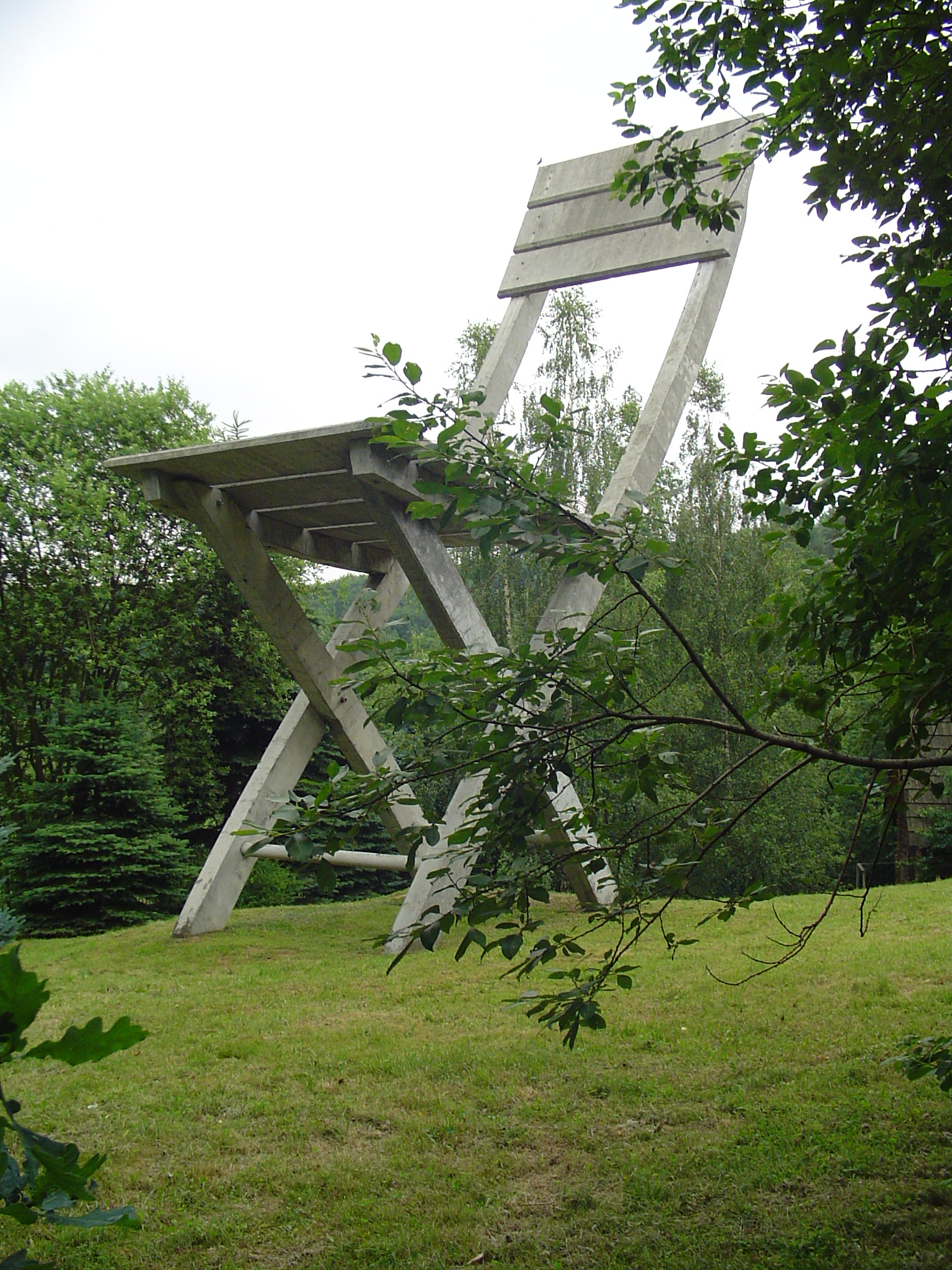 Rzeźba autorstwa Tadeusza Kantora - autor zdjęcia Michał Sapeta